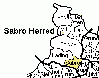 Kort der viser Sabro Sogn, Sabro Herred, Århus Amt, Denmark.